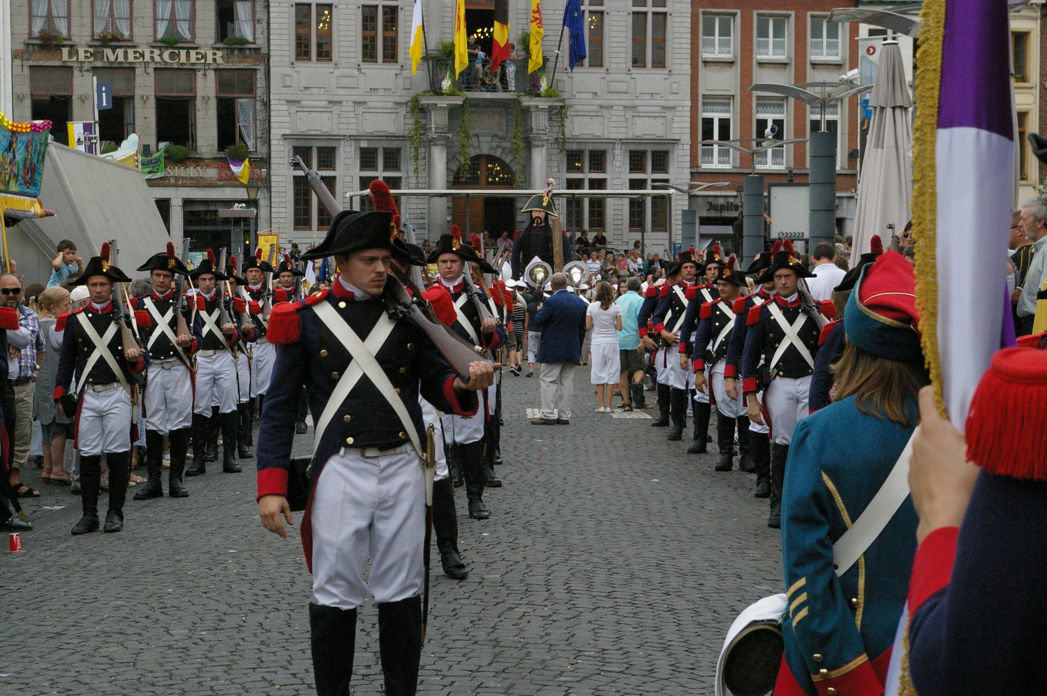 Le groupe des "Bleus" lors de la Ducasse d'Ath 2010. Modification du costume.